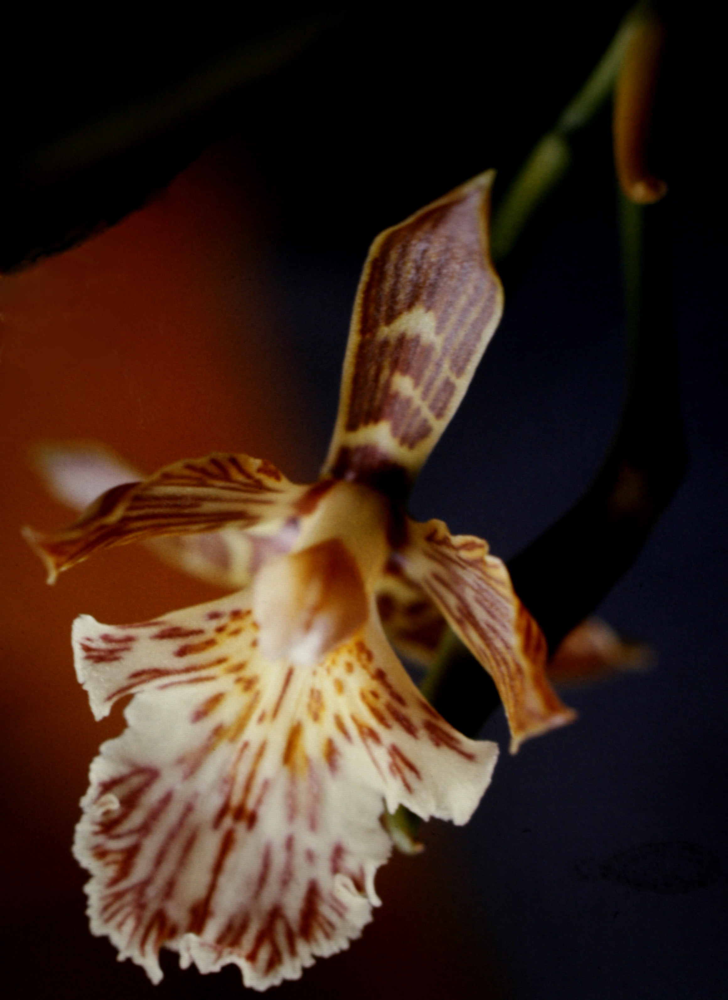 Aspasia variegata, Suriname.